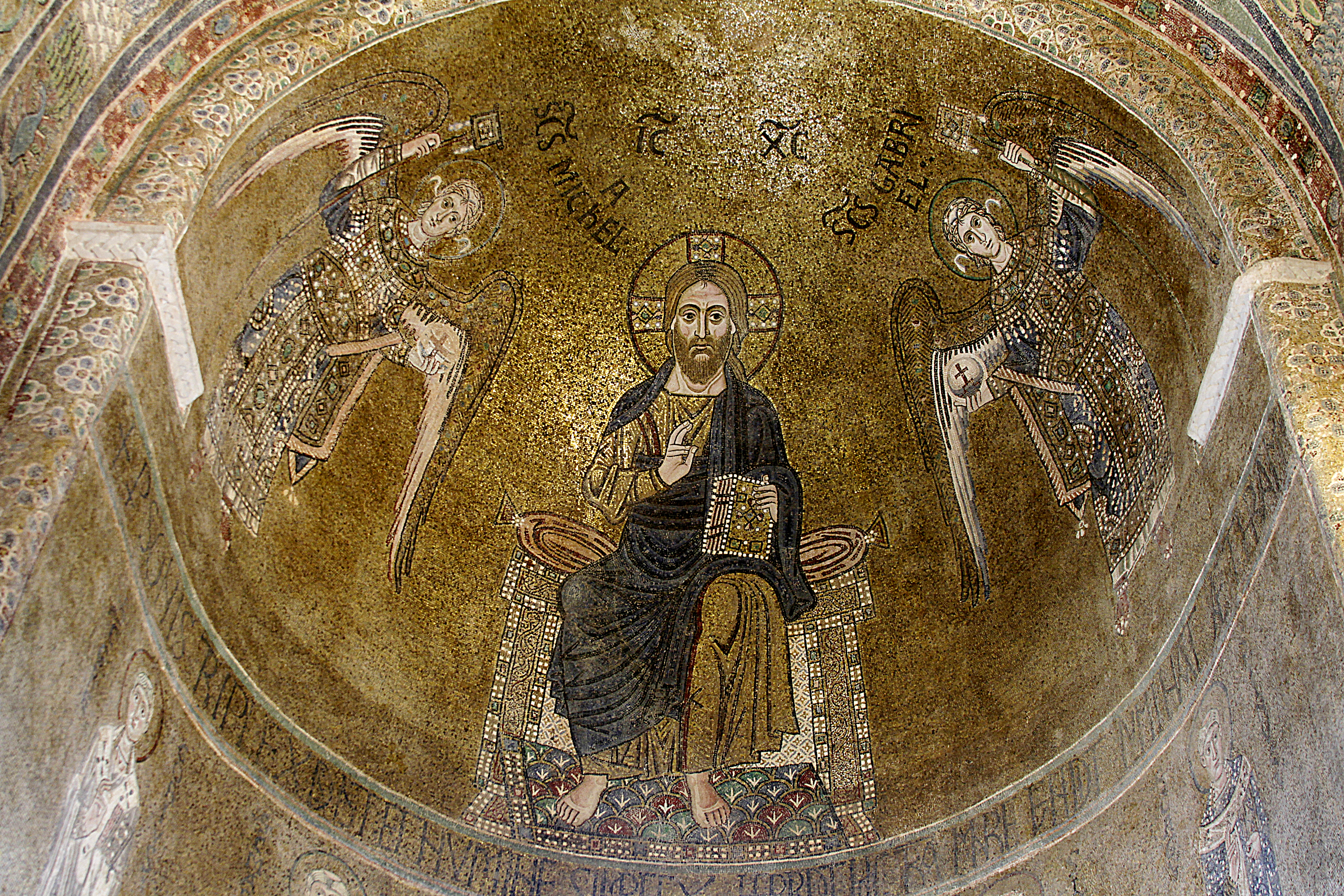 Christ Pantocrator - Santa Maria Assunta (Torcello) - Venic